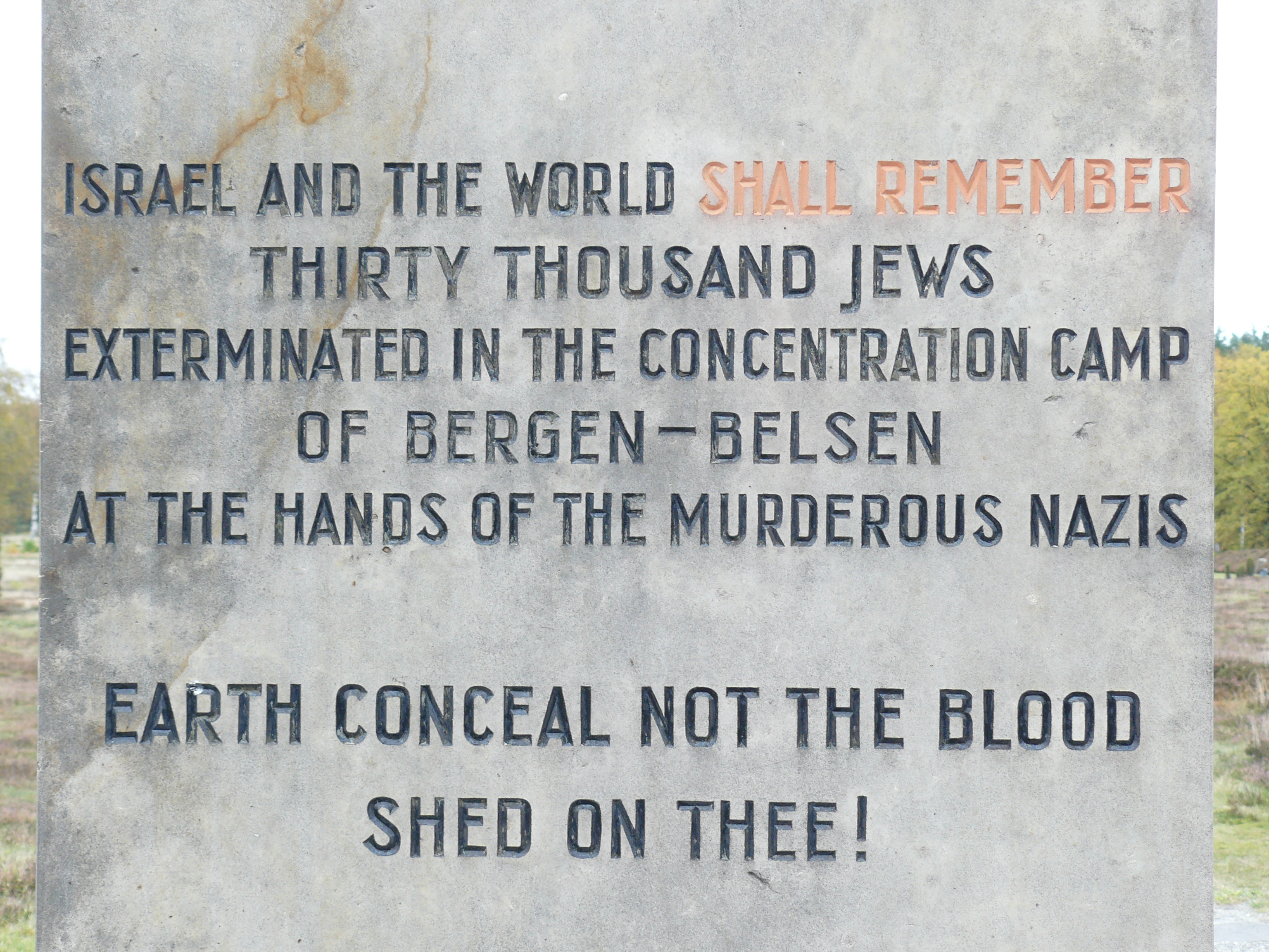 Jüdischer Gedenkstein auf dem Gelände der Gedenkstätte Bergen-Belsen